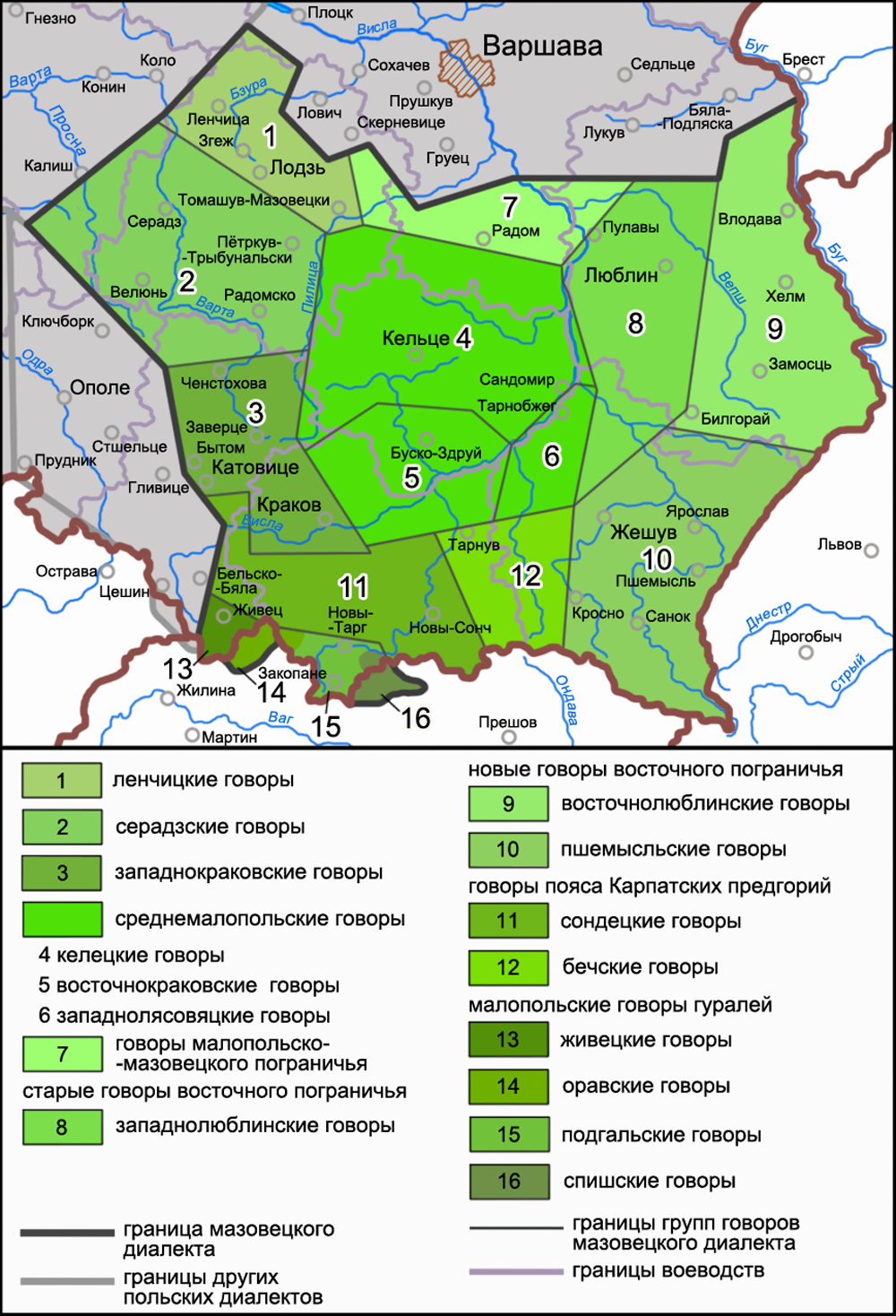 Карта распространения говоров малопольского диалекта. На основе карты С. Урбанчика (без ловичских говоров и с выделением подгрупп в ареалах среднемалопольских говоров, гуральских говоров и говоров восточного пограничья): Urbańczyk S. Zarys dialektologii polskiej. Wydanie trzecie. Warszawa, 1968; Dialekty i gwary polskie. Kompendium internetowe pod redakcją Haliny Karaś — Opis dialektów polskich. Dialekt małopolski. Zasięg terytorialny i podziały dialektu; Dialekty i gwary polskie. Kompendium internetowe pod redakcją Haliny Karaś — Opis dialektów polskich. Dialekt małopolski.